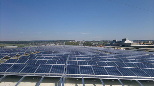 Ferrowohlen in Wohlen, Photovoltaikanlage auf Halle B